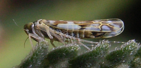 Garten-Blattzikade (Eupteryx florida) an Katzenminze (Nepeta cataria), Garten in Niedersachsen